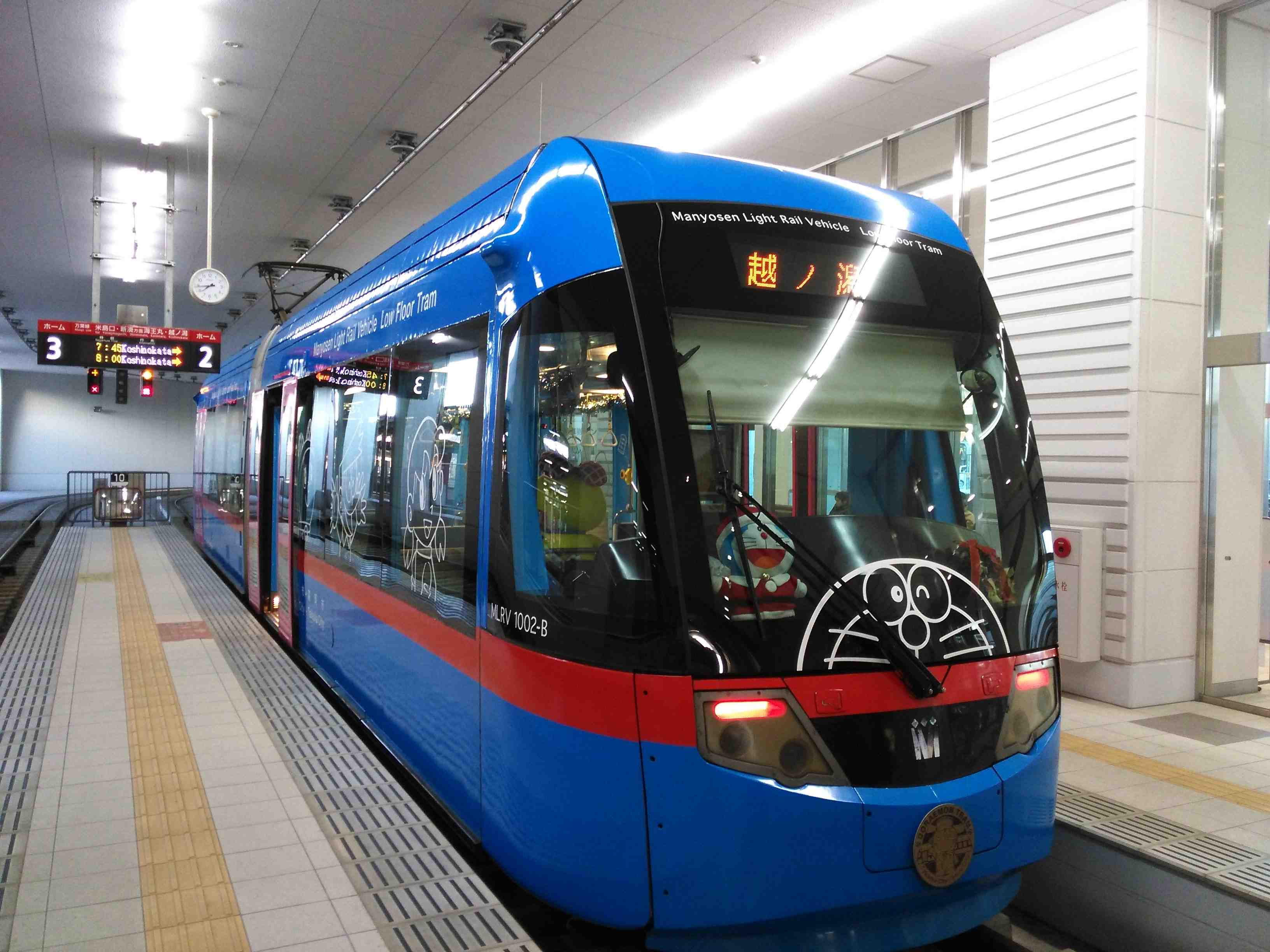 万葉線ドラえもんトラム